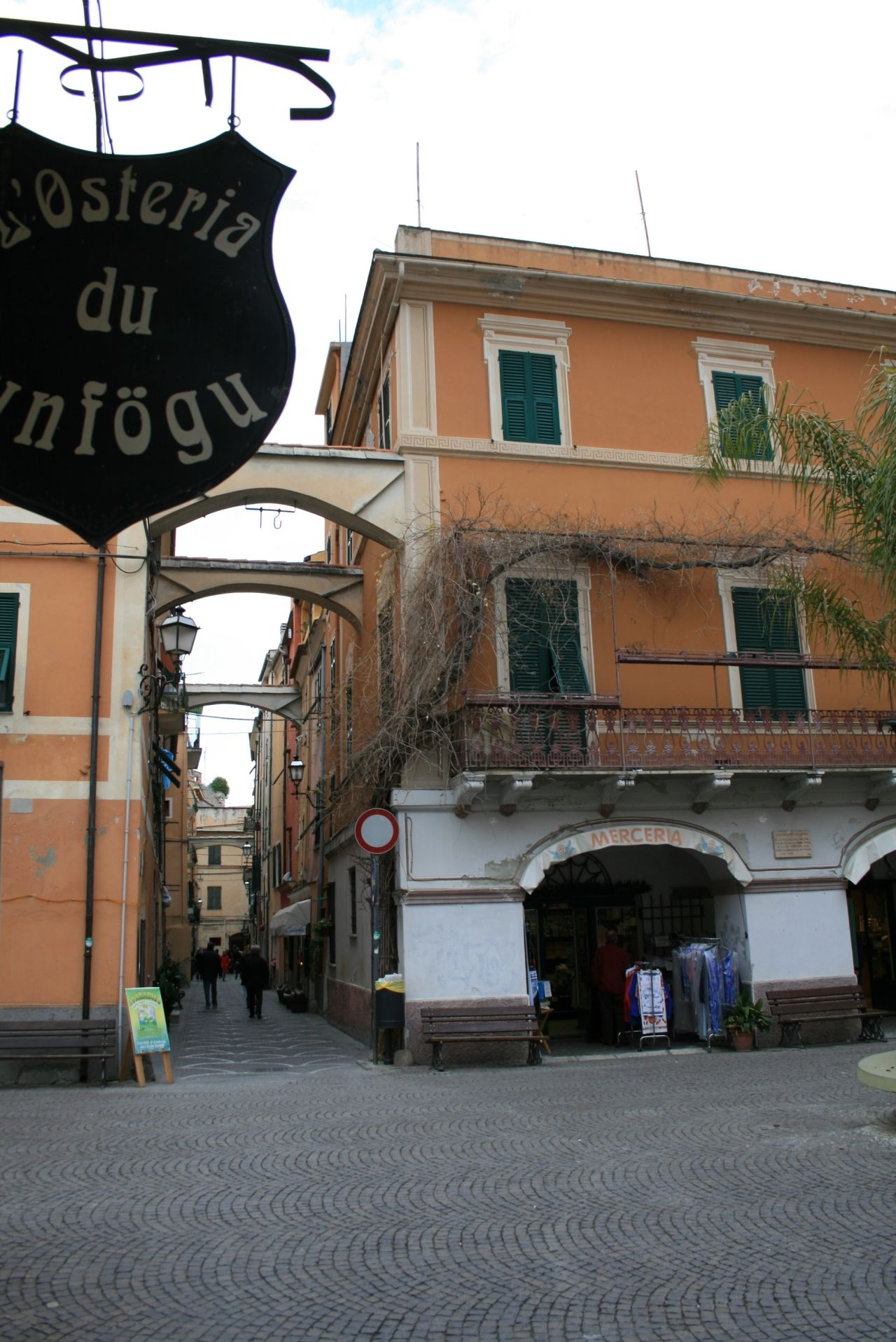 Pietra Ligure "I Caruggi"